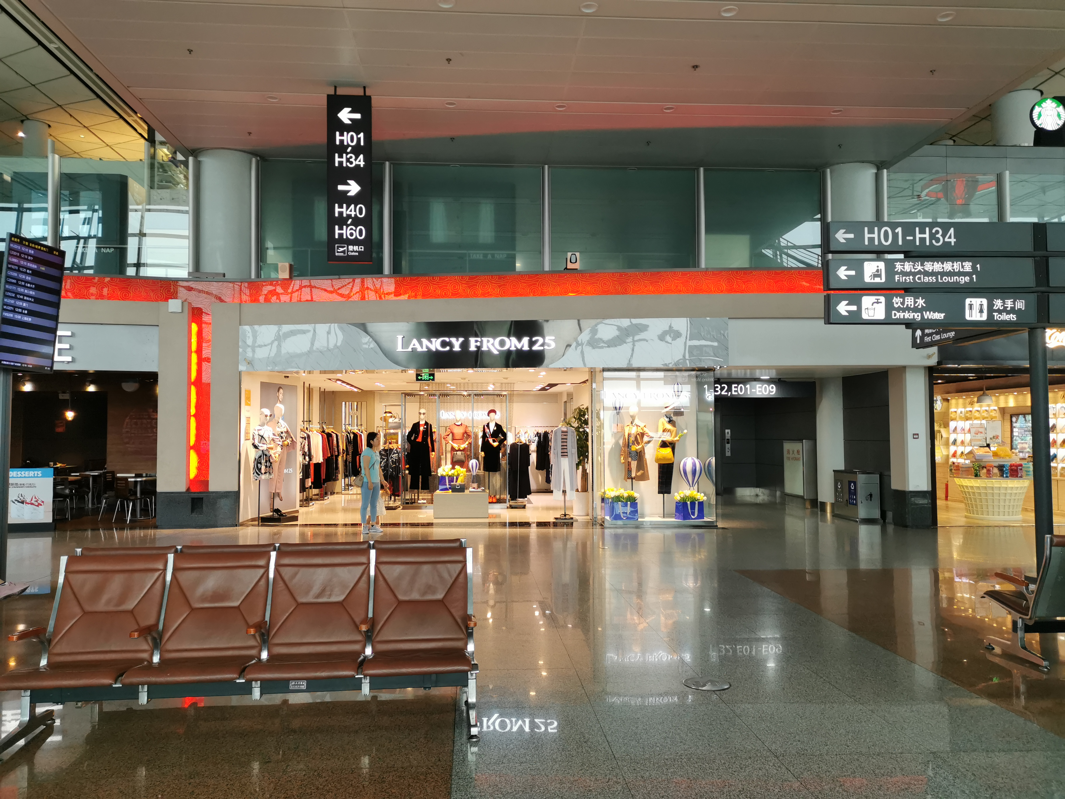 西安咸阳国际机场T3航站楼候机大厅1楼